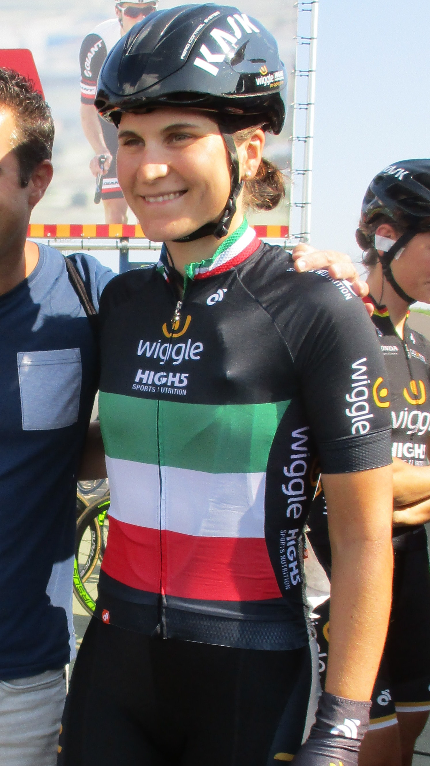 Start van de 6e etappe van de Boels Ladies Tour 2017 op het Tom Dumoulin Bike Park in Sittard-Geleen.